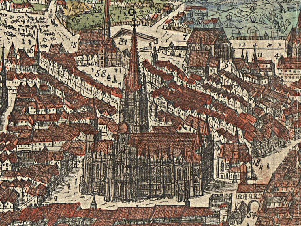 Vogelschau auf Wien von Norden. Zweite, unveränderte Ausgabe von 1640, basierend auf der ersten Ausgabe von 1609. Ausschnitt, den Stephansplatz zeigend.